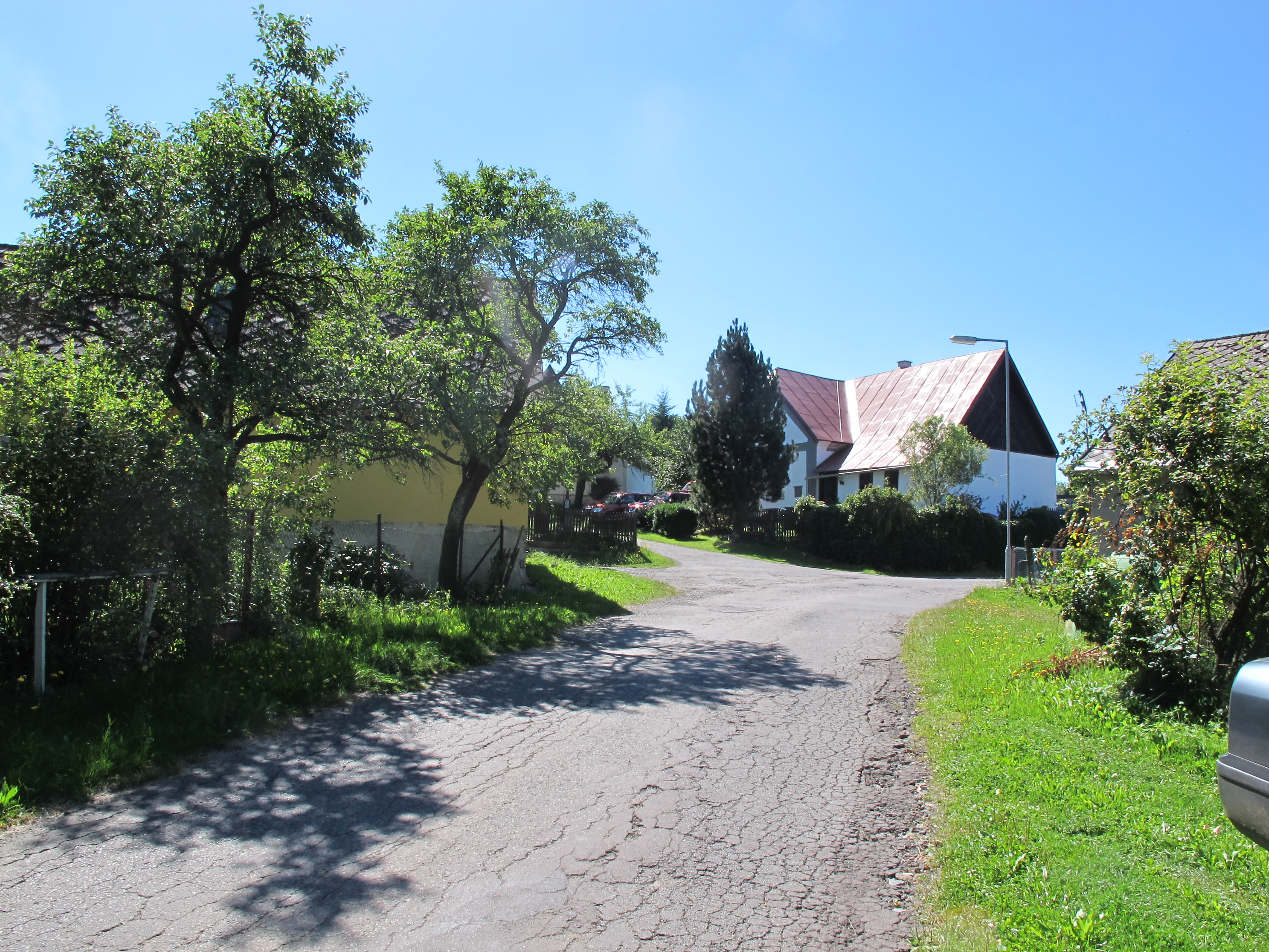 Velká Střítež